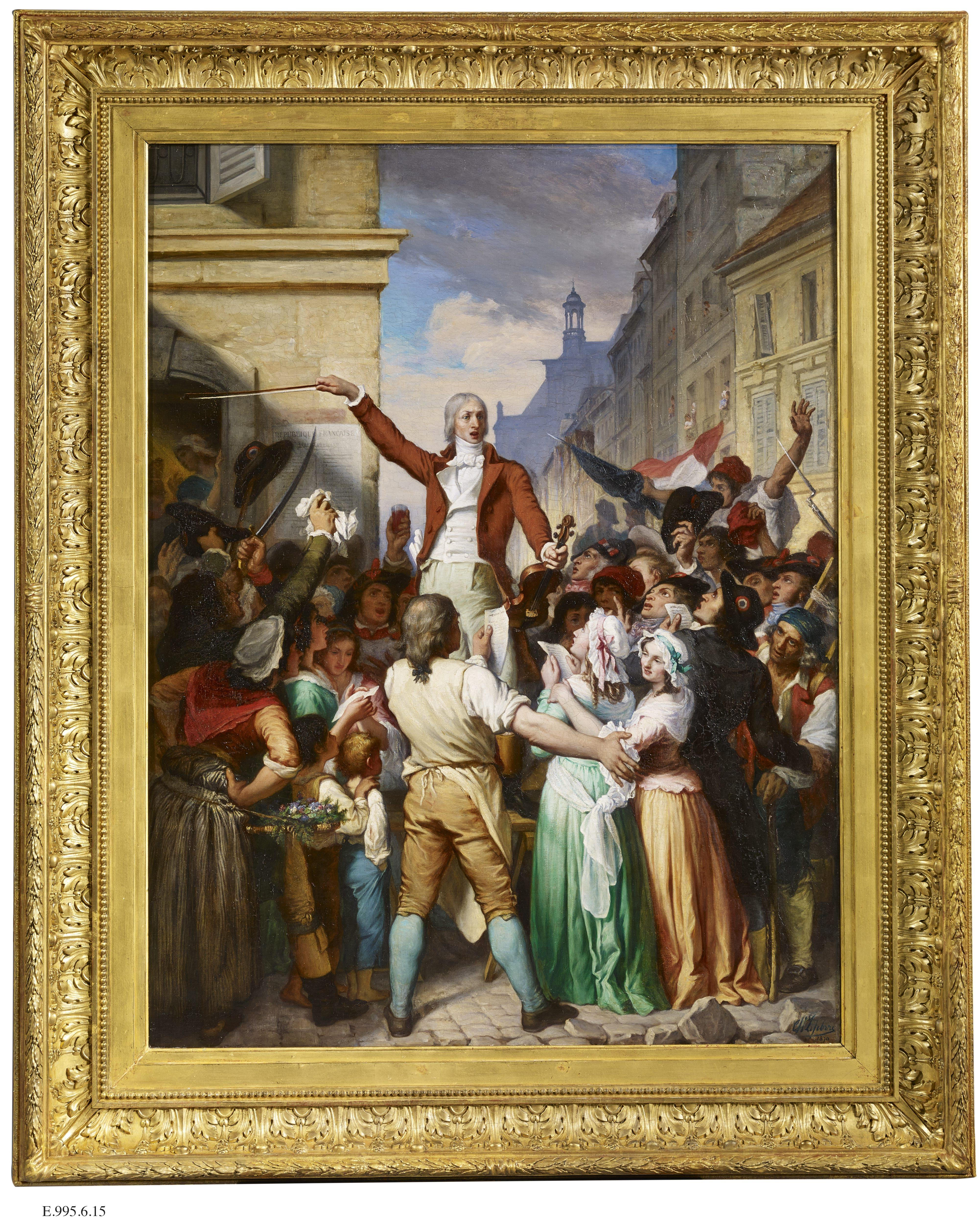 Méhul enseignant les chants patriotiques au peuple de Paris Auteur : Lefebvre, Charles-Victor-Eugène en 1870.